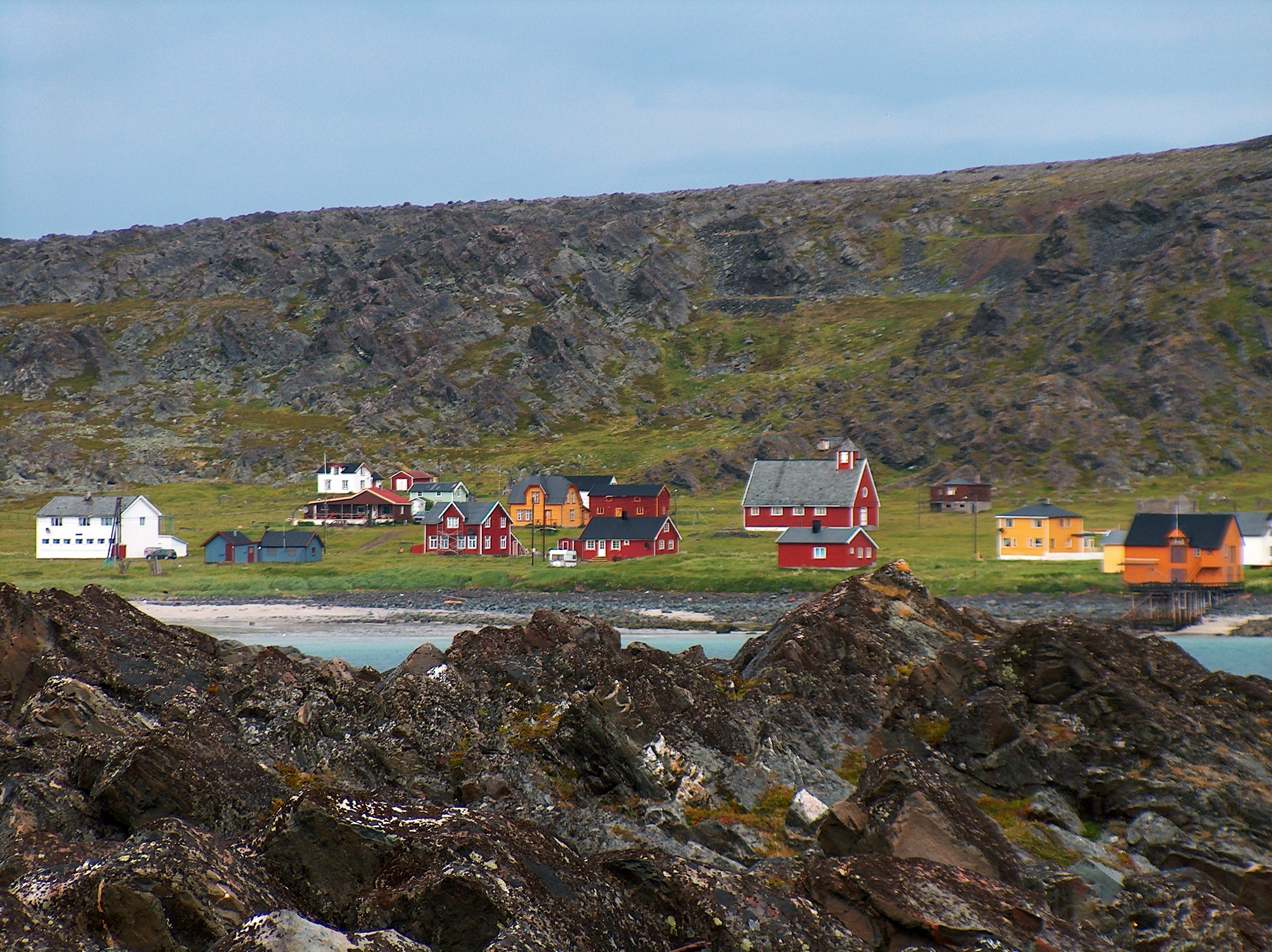 Hamningberg. Photo taken in summer 2006